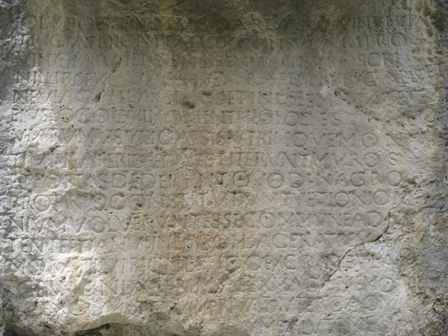 Texte latin gravé dans la roche, mentionnant le préfet des Gaules Claudius Postumus Dardanus, son épouse Naevia Galla et son frère Claudius Lepidus. (Chardavon - Saint-Geniez - Alpes de Haute-Provence, France)